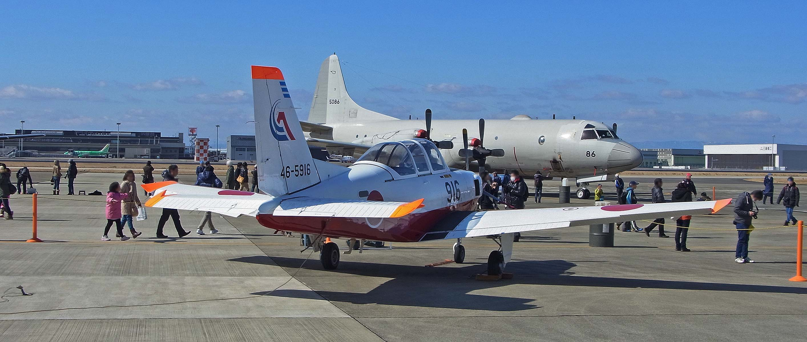 T-7 JASDF / 航空自衛隊